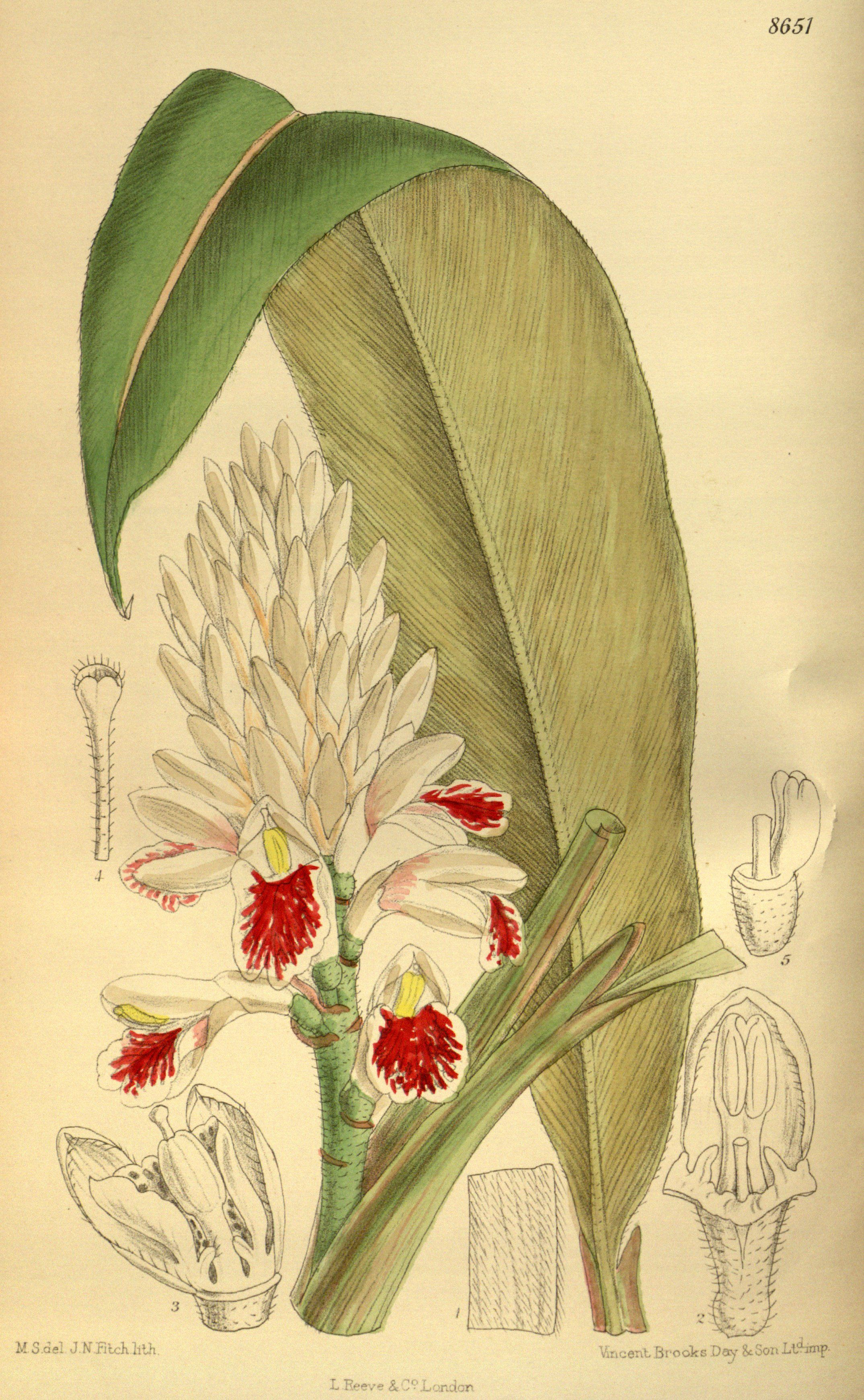 Alpinia elwesii (= Alpinia kawakamii), Zingiberaceae